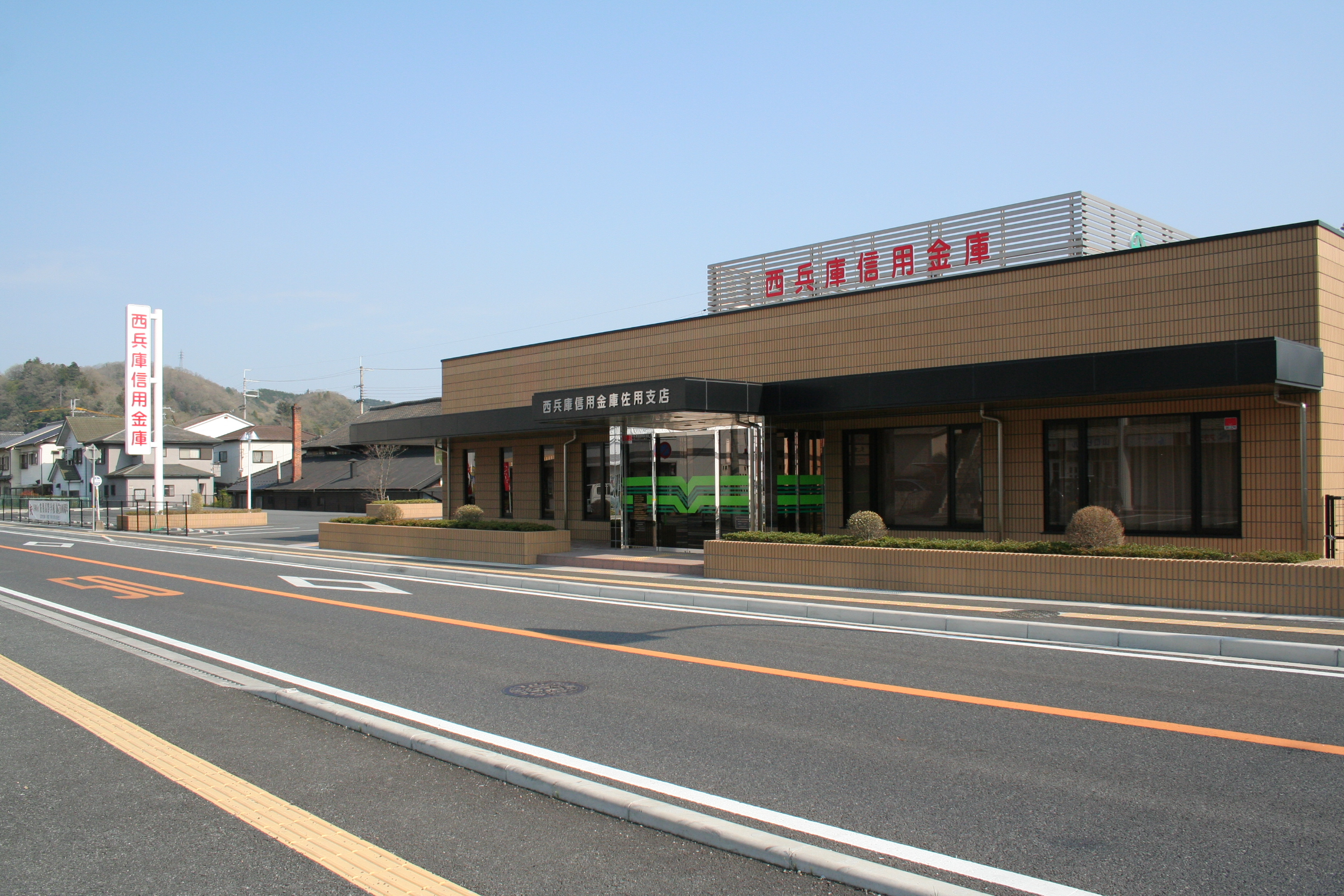 兵庫県南西部にある様々な建物。 西兵庫信用金庫佐用支店。